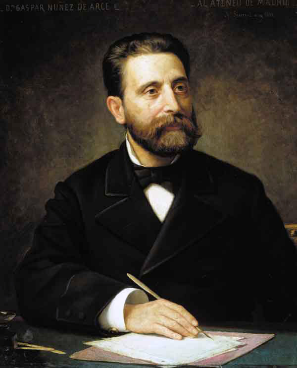 Retrato de Núñez de Arce